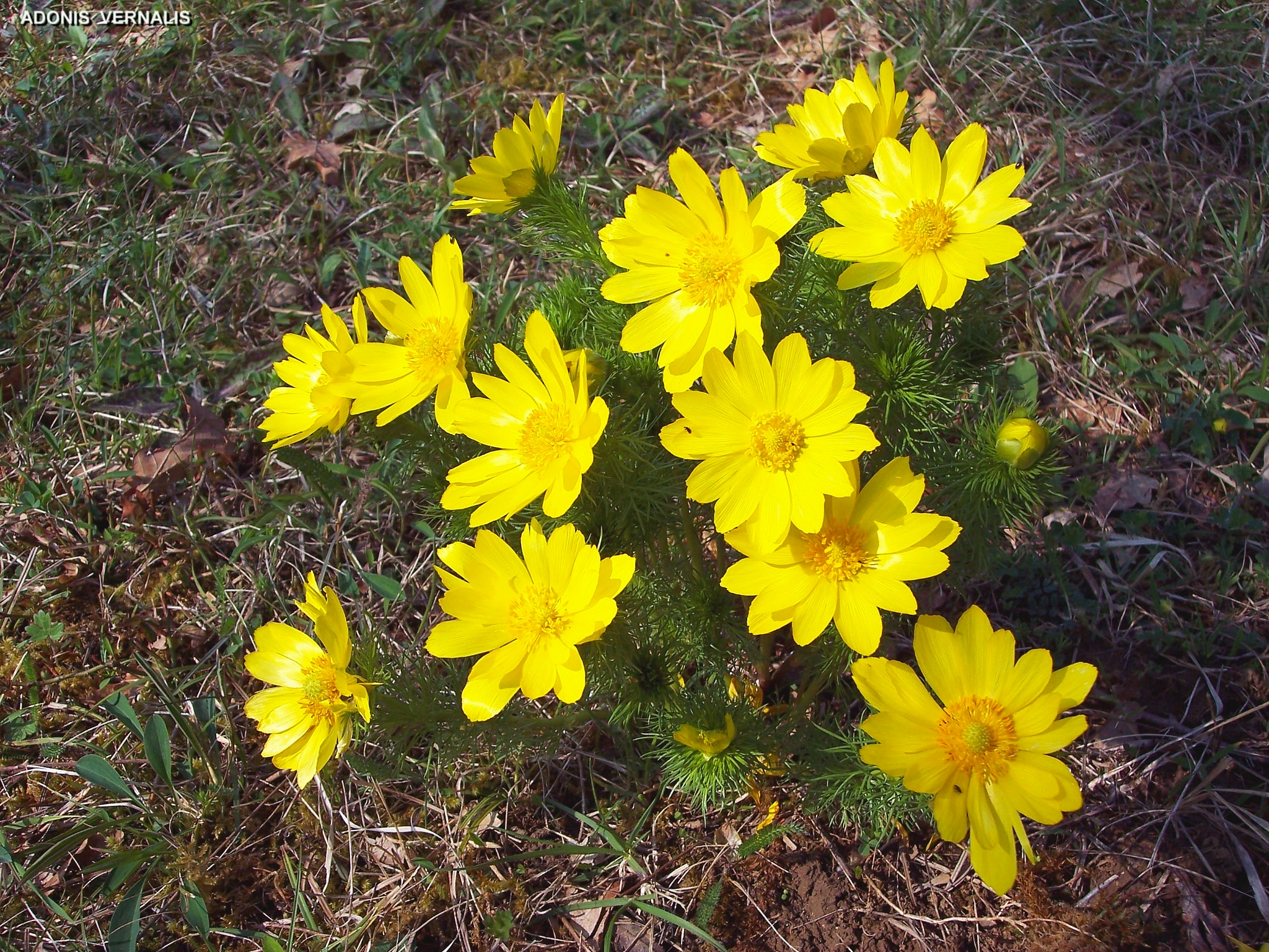 Un pied bien fleuri d'adonis vernalis en forêt de Hartwald